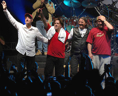 Леб и сол са концерта у Метрополис арени - Скопље